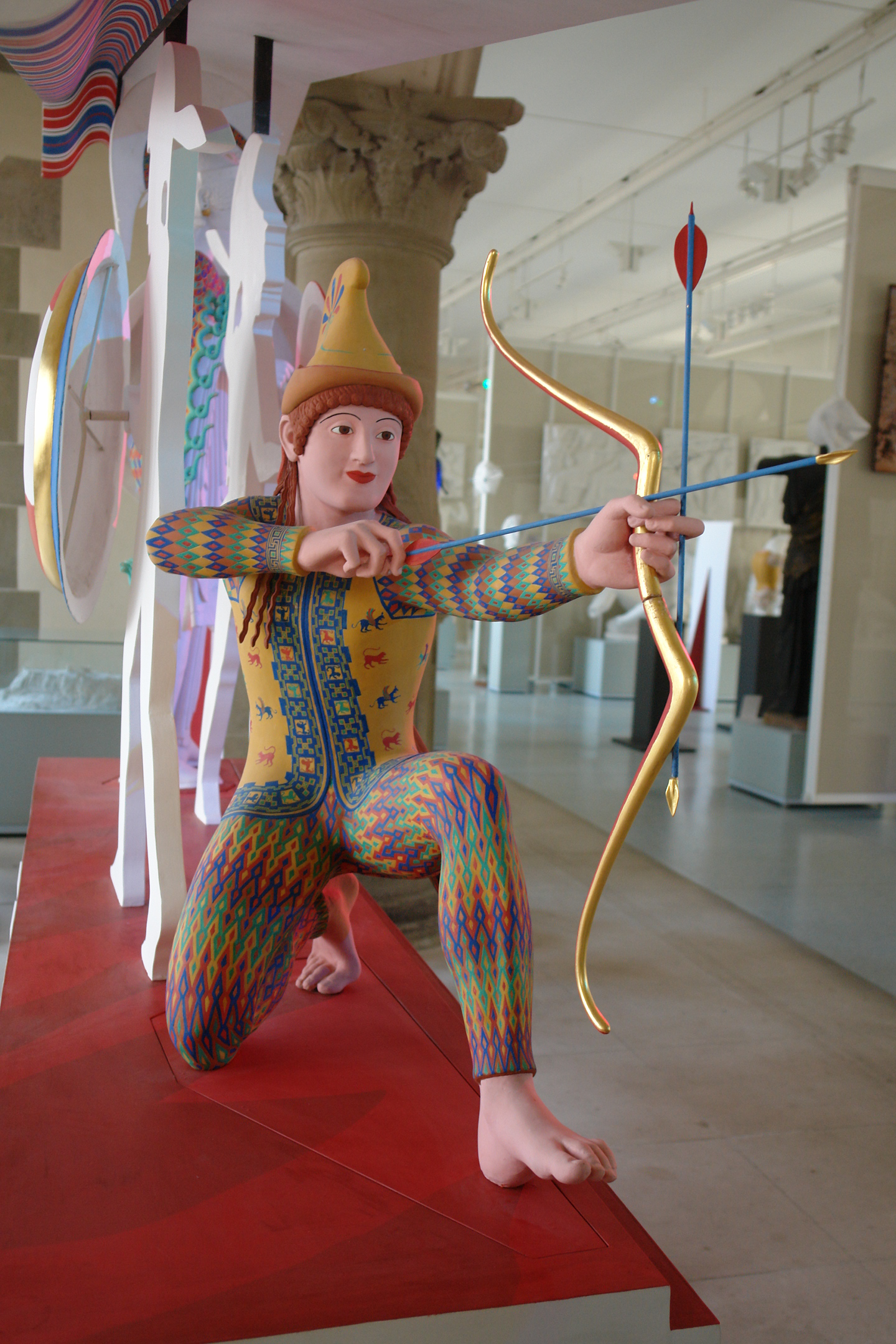 Bemalter Gipsabguss eines Ägineten im MUT (Museum der Uni Tübingen) im Tübinger Schloss